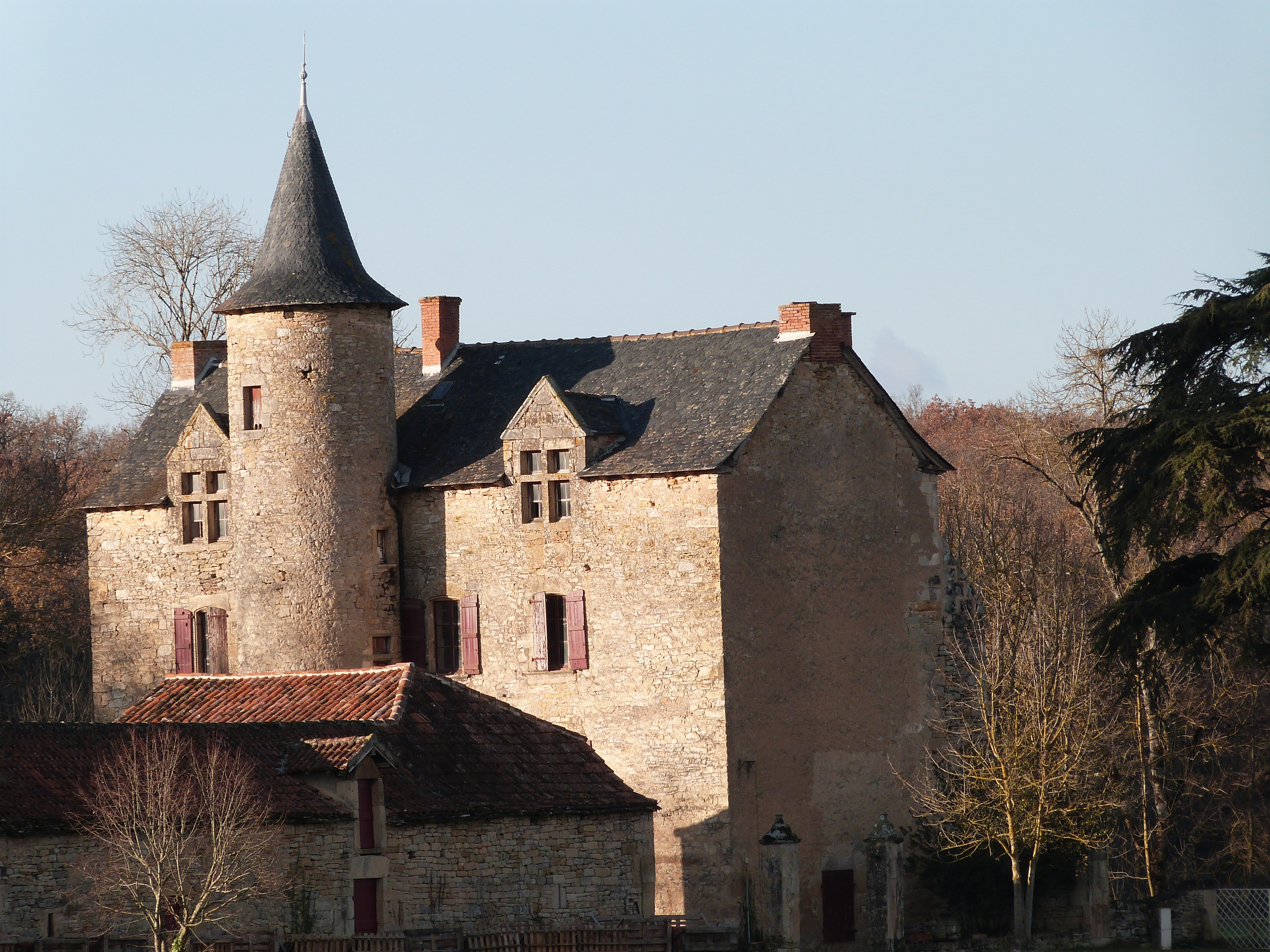 Château de Cambayrac (Inscrit) .